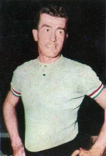 Louison Bobet en 1954-55 - Campioni dello Sport 1967-1968, n°288